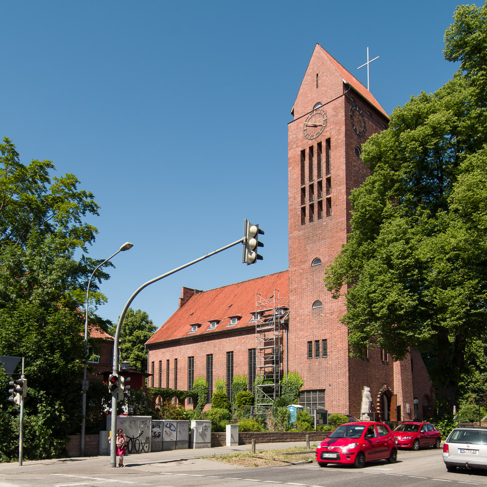 Lutherkirche von Südwesten